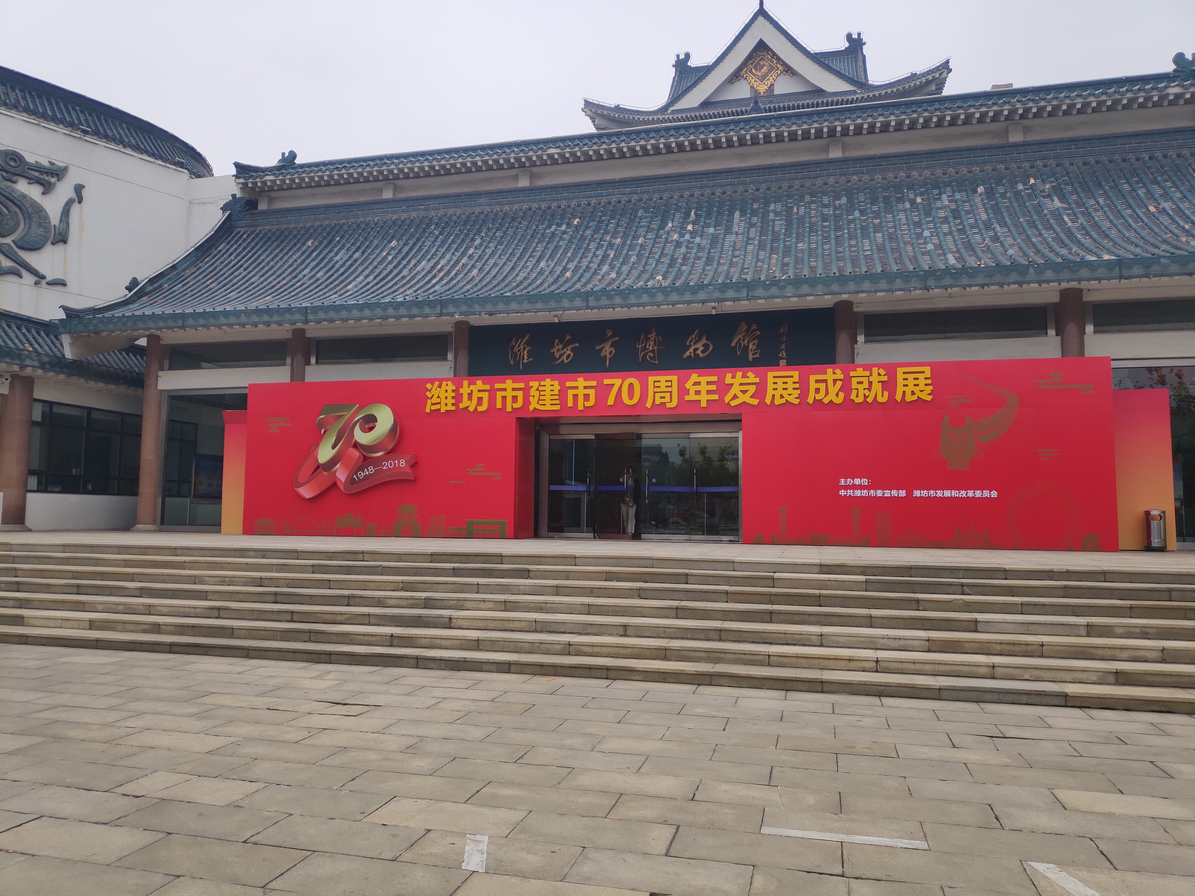 中文（中国大陆）: 潍坊市博物馆